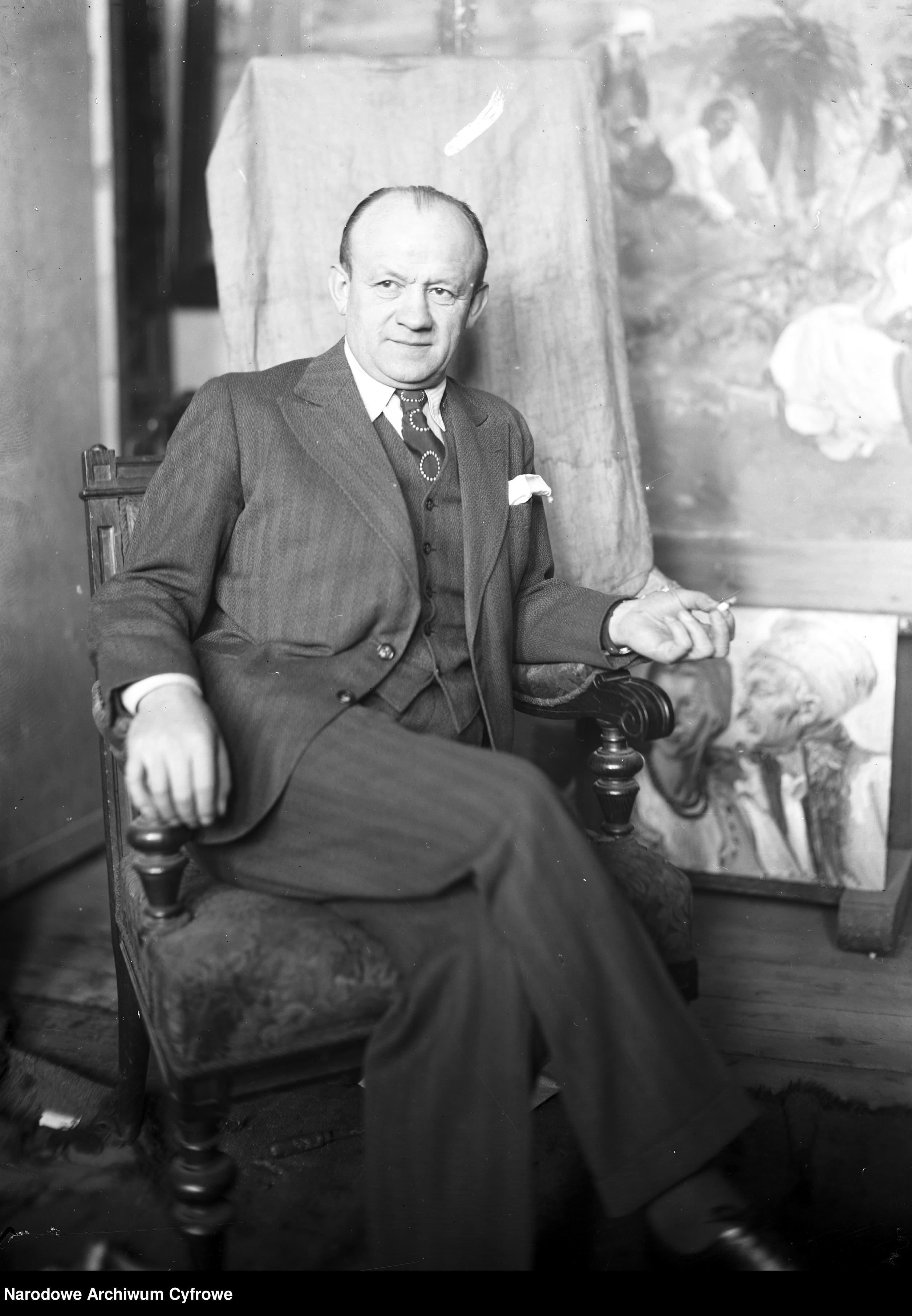 Mieczysław Dobija, dyrektor Koncernu Ilustrowany Kurier Codzienny - fotografia portretowa.